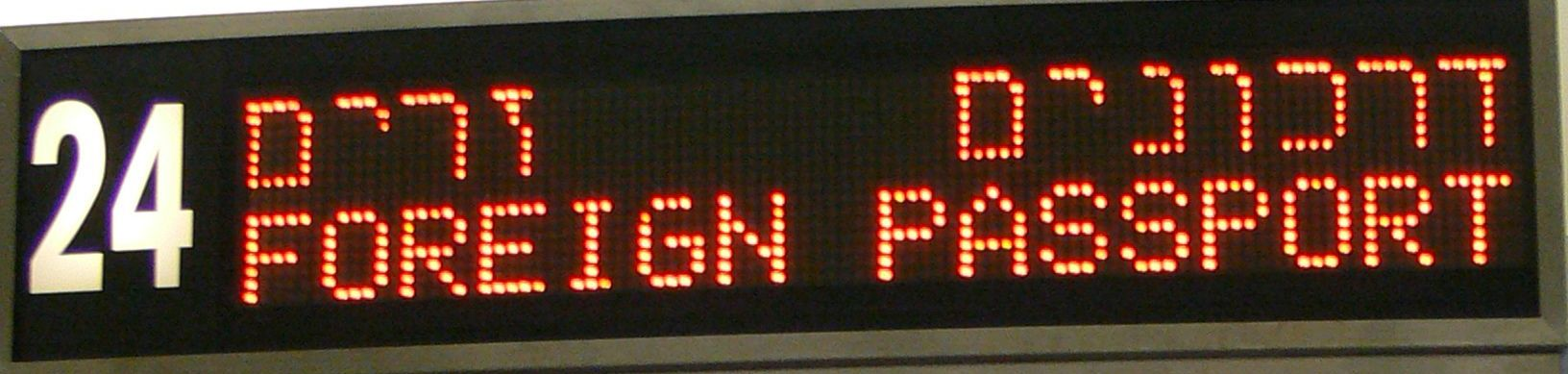 Segn u passi kontroll, TLV Self work